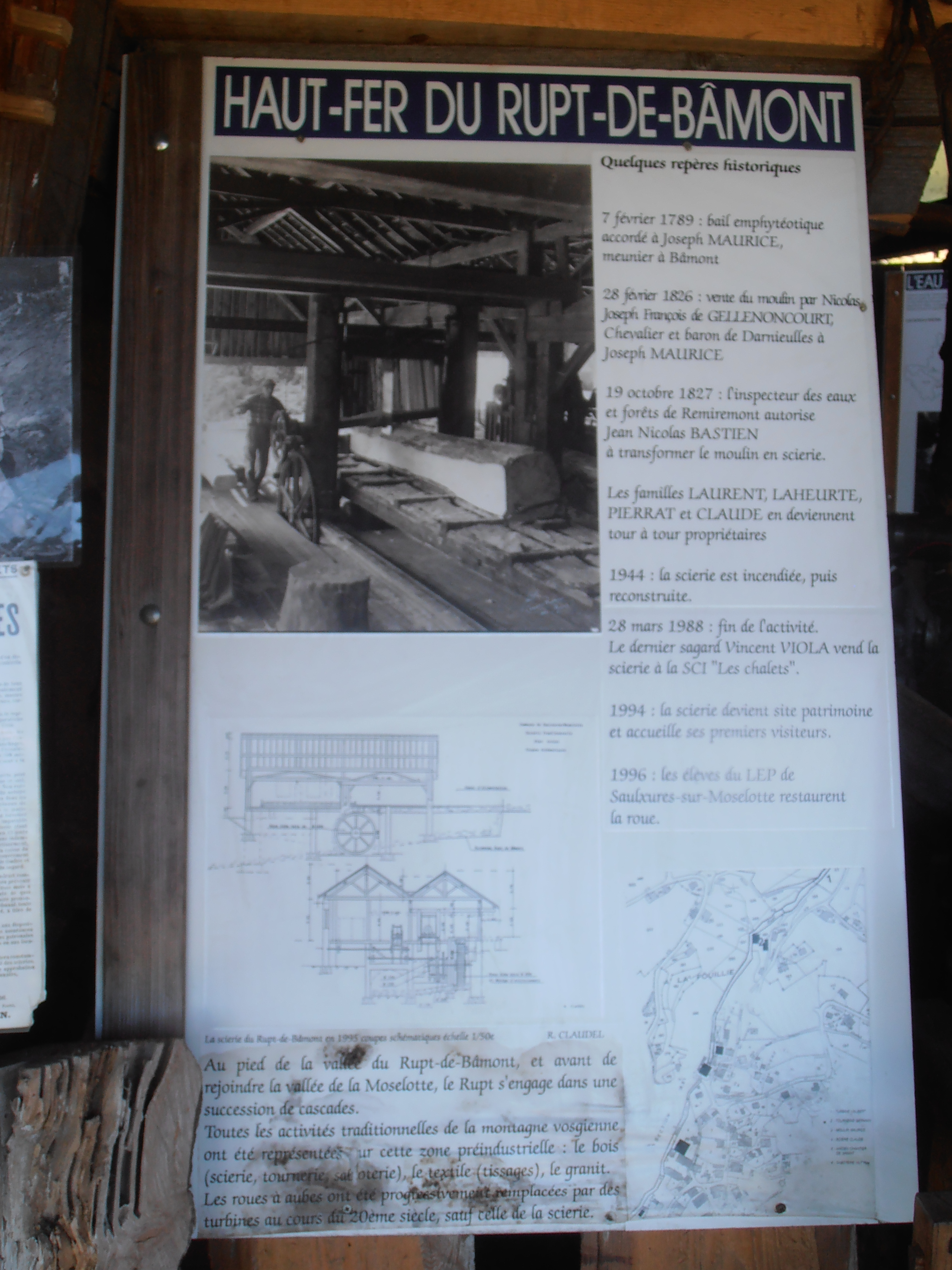 Vosges, Saulxures-sur-Moselotte, Musée du bois